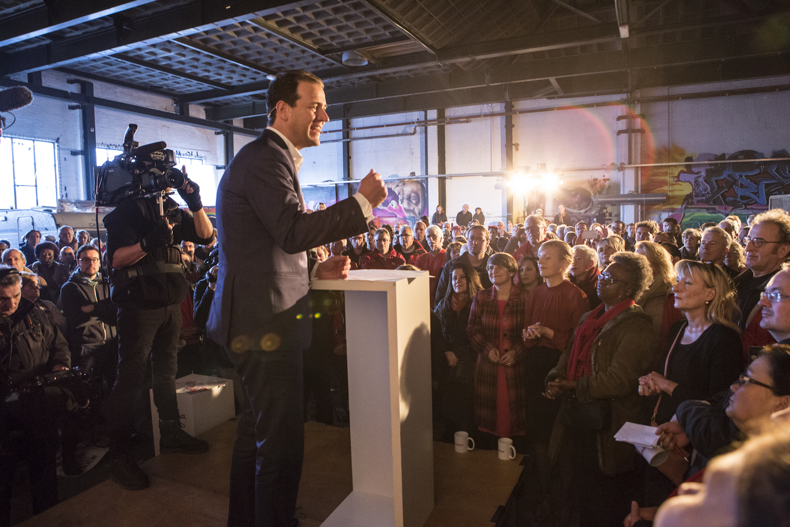 Foto: Rebke Klokke